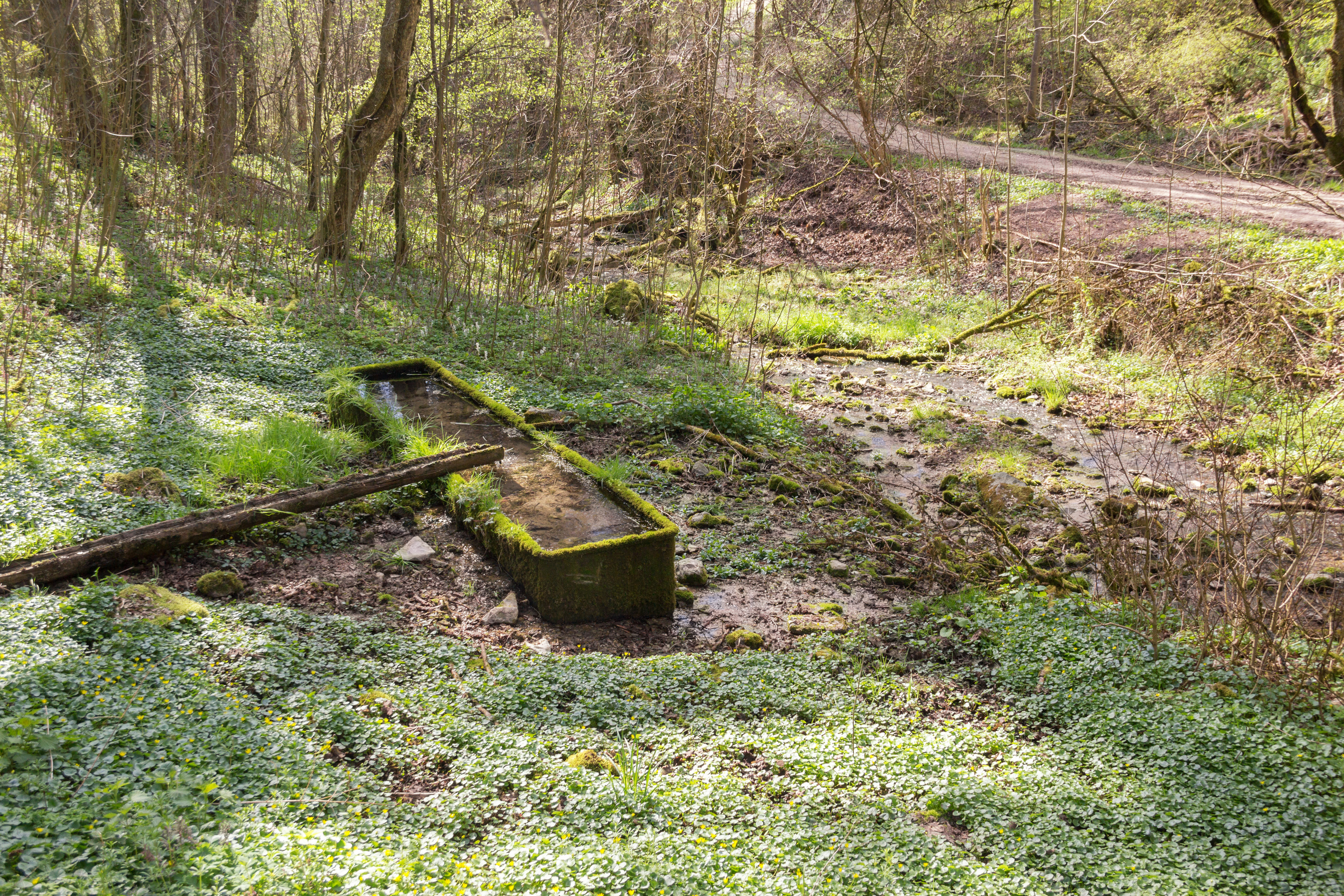 Kuhbachtal, Hausen, Röckenhofen, Naturschutzgebiet Kuhbachtal bei Hausen, Landschaftsschutzgebiet und Naturpark Altmühltal, FFH-Gebiet Trauf der südlichen Frankenalb